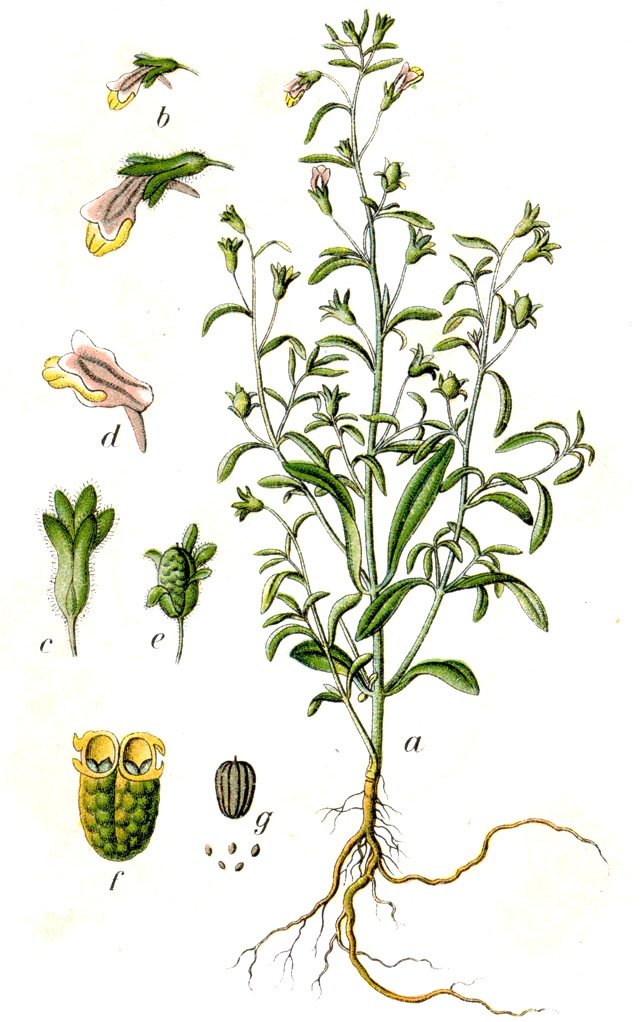 Chaenorhinum minus subsp. minus, syn. Antirrhinum minus L. Original Description Kleines Löwenmaul, Antirrhinum minus